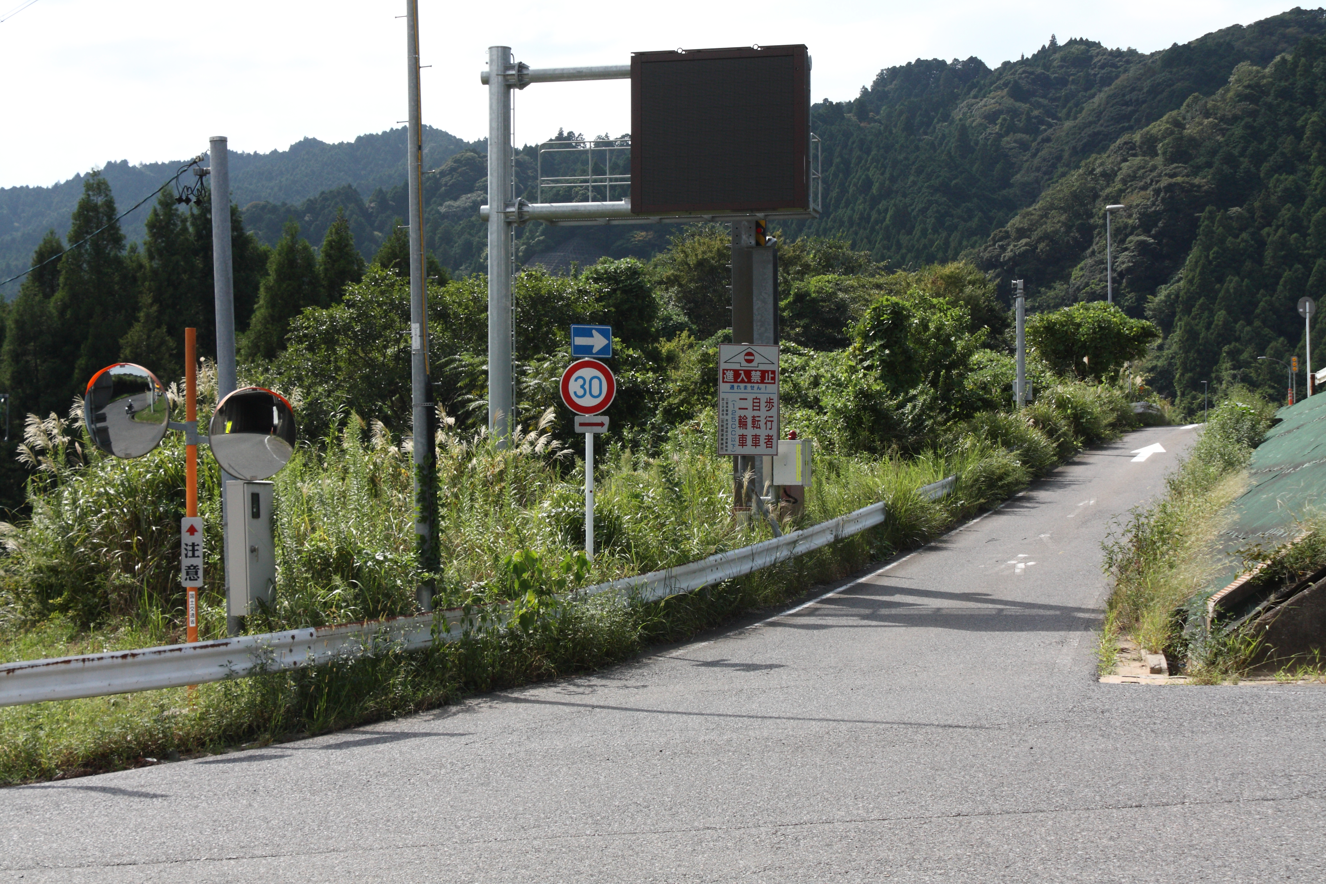 名阪国道 久我インターチェンジ（ダイヤモンド型） 天理方面入口 三重県亀山市関町久我